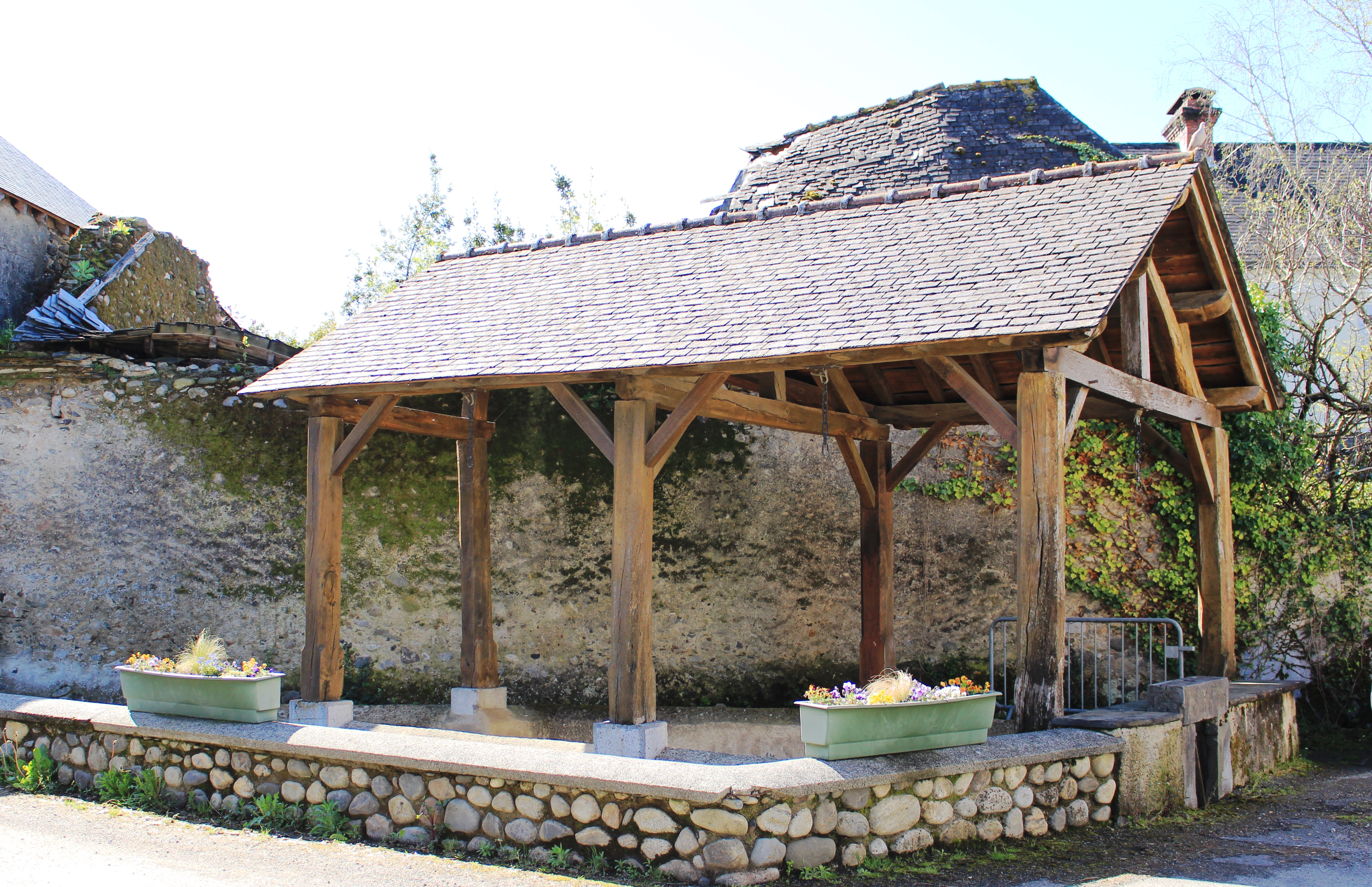 Lavoir de Loubajac (Hautes-Pyrénées)